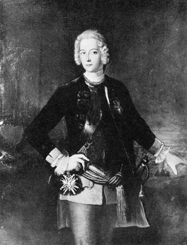 Портрет Фридриха Великого в молодости